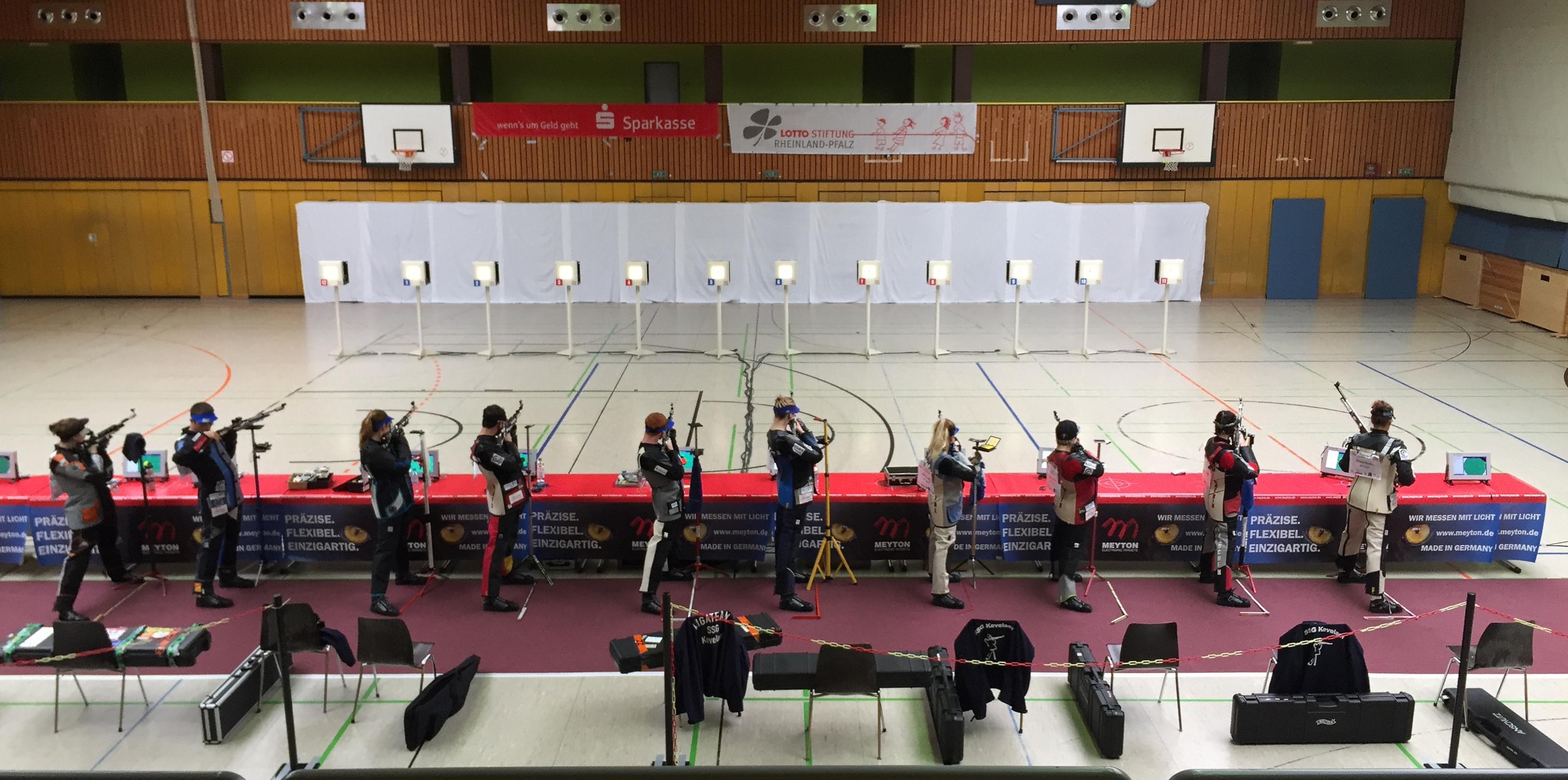 Bundesliga Luftgewehr Halle